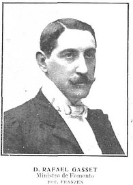 Retrato de Rafael Gasset Chinchilla, fotografiado por Christian Franzen y recogido en la revista española Nuevo Mundo.